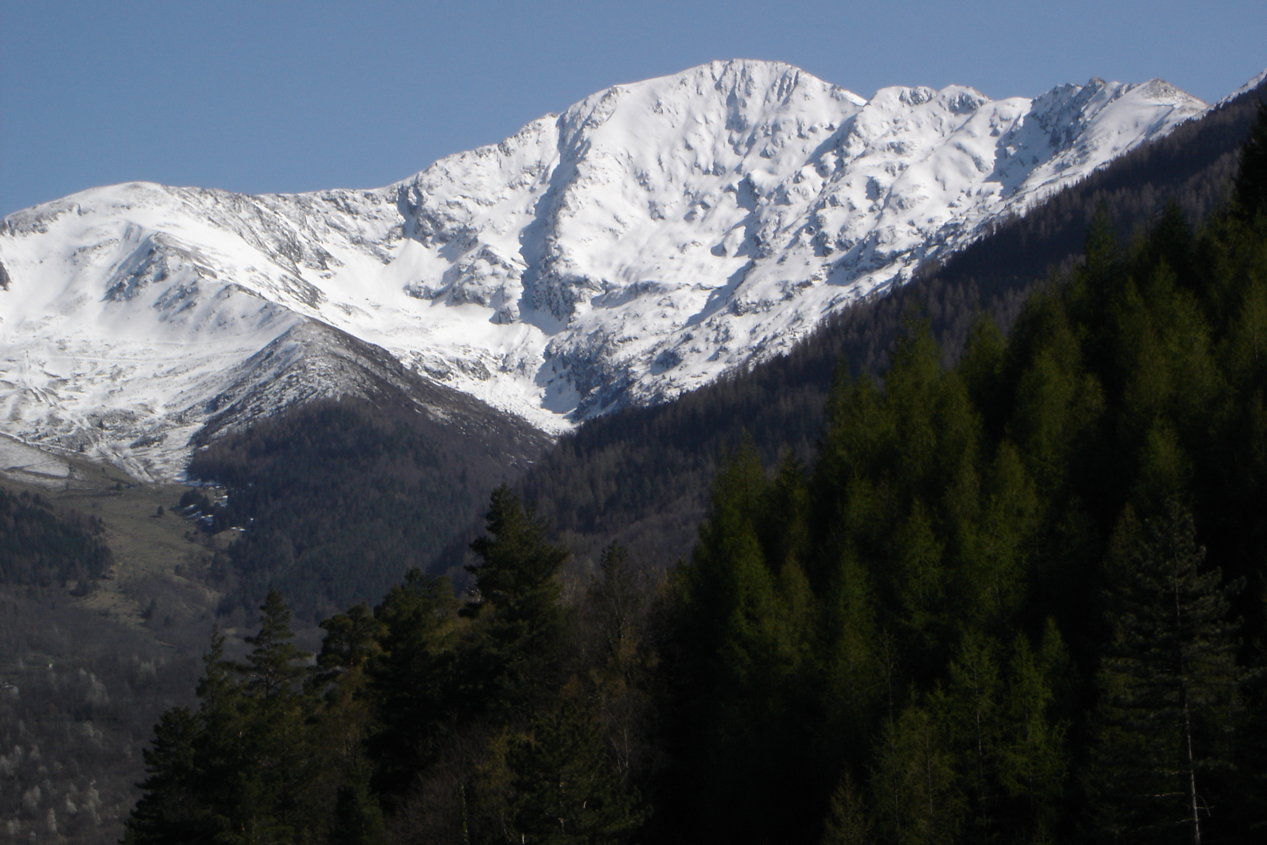 La Pique d'Endron (2 472 m)